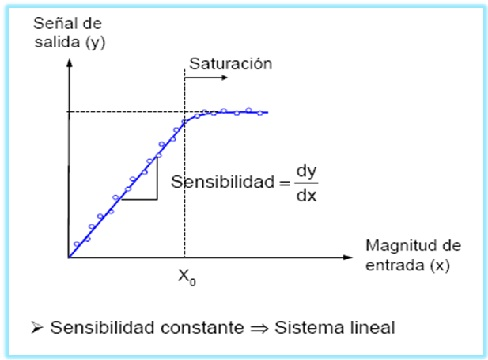 Sensibilitat i Corba de calibració